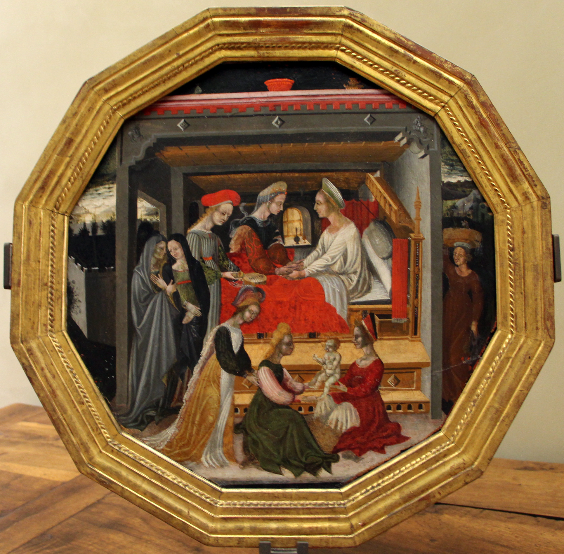 Galleria G. Franchetti alla Ca' d'Oro - MIBAC The making of this document was supported by Wikimedia CH. (Submit your project!) For all the files concerned, please see the category Supported by Wikimedia CH. This is a photo of a monument which is part of cultural heritage of Italy.